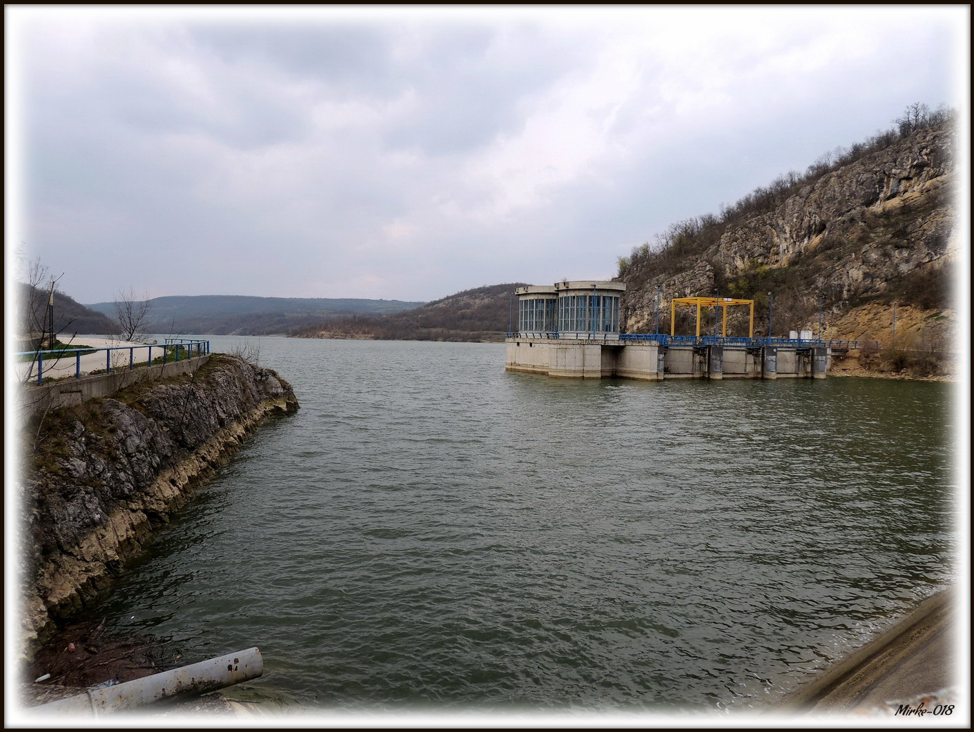 Грлишко језеро